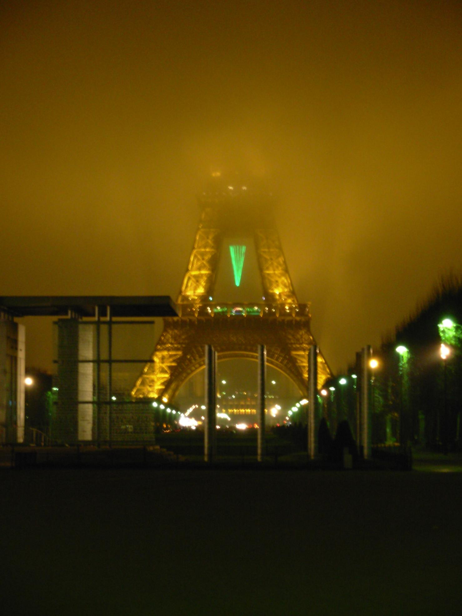 Eiffel Toren